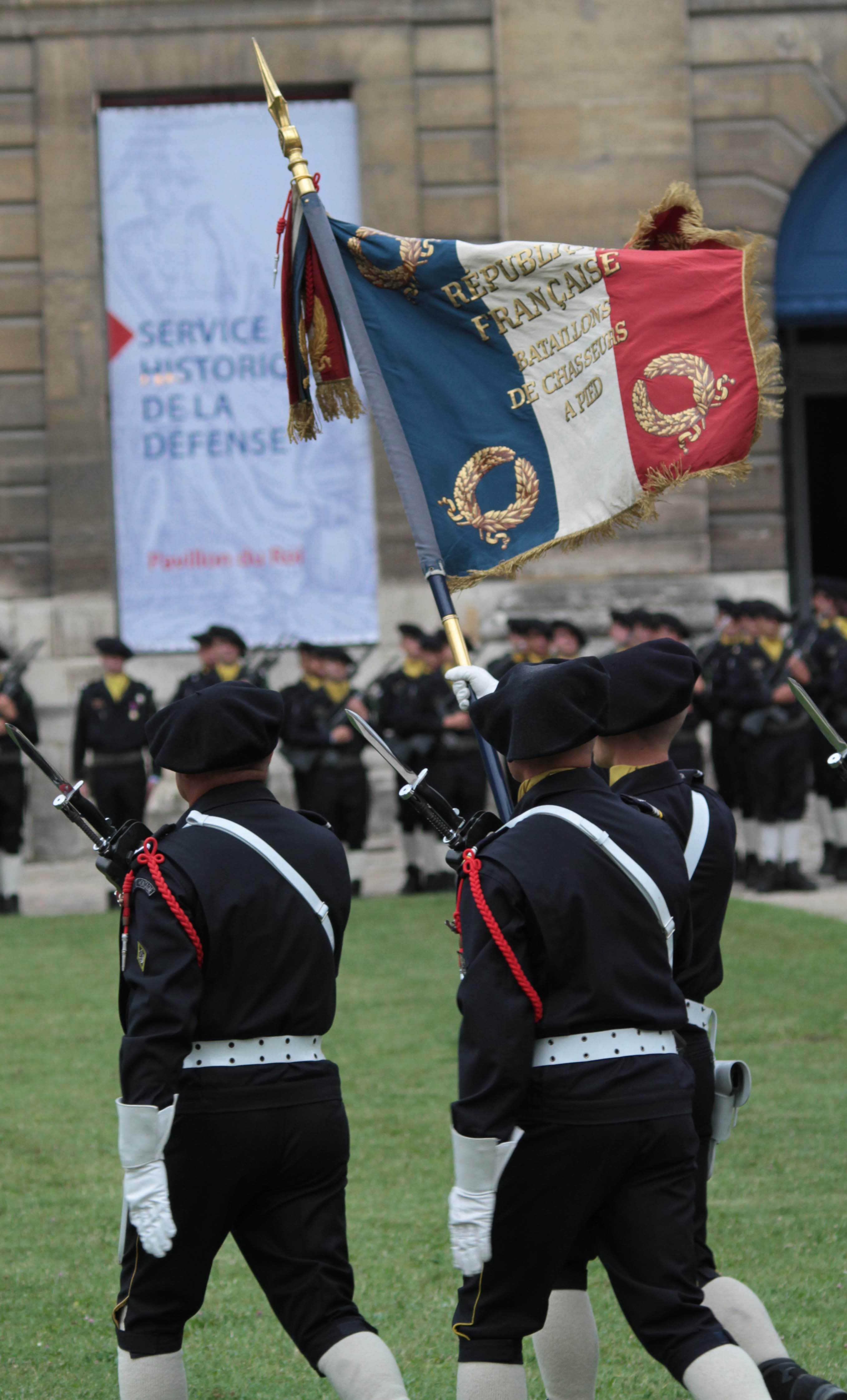 Drapeau des Chasseurs à Vincennes le 17/09̟/11